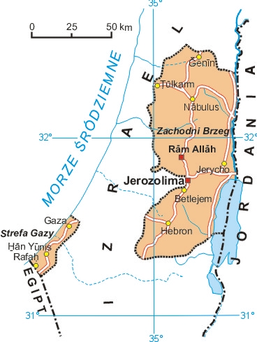 Mapa Palestyny. Autor: Aotearoa